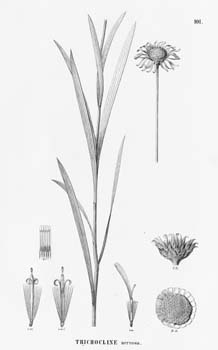 Lulia nervosa [syn. Trichocline nervosa Less.] (Asteraceae, Cichorioideae, Mutisieae, Mutisiinae)